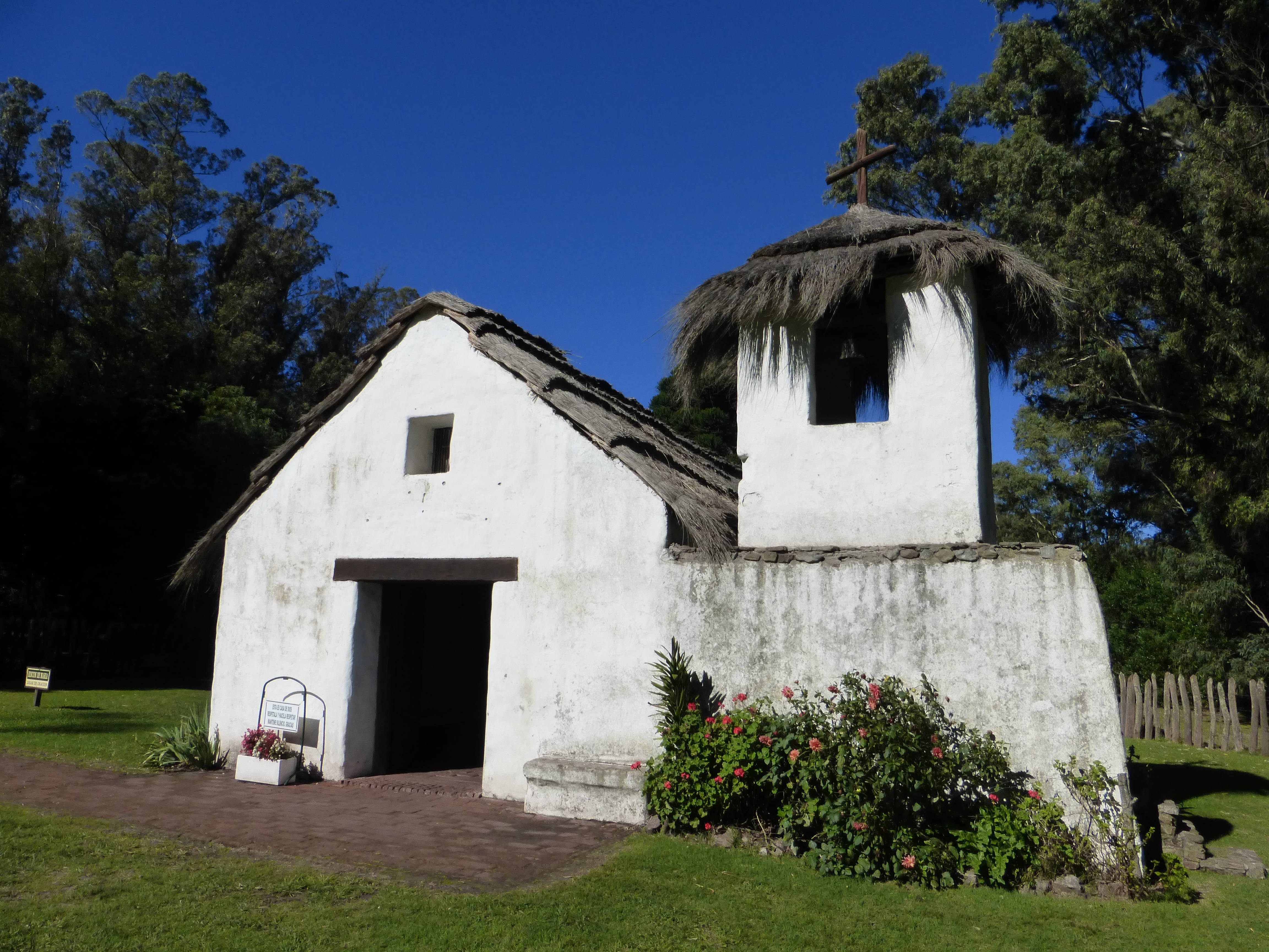 Reducción Nuestra Señora de Pilar (Reconstrucción), frente a la Laguna de Los Padres.